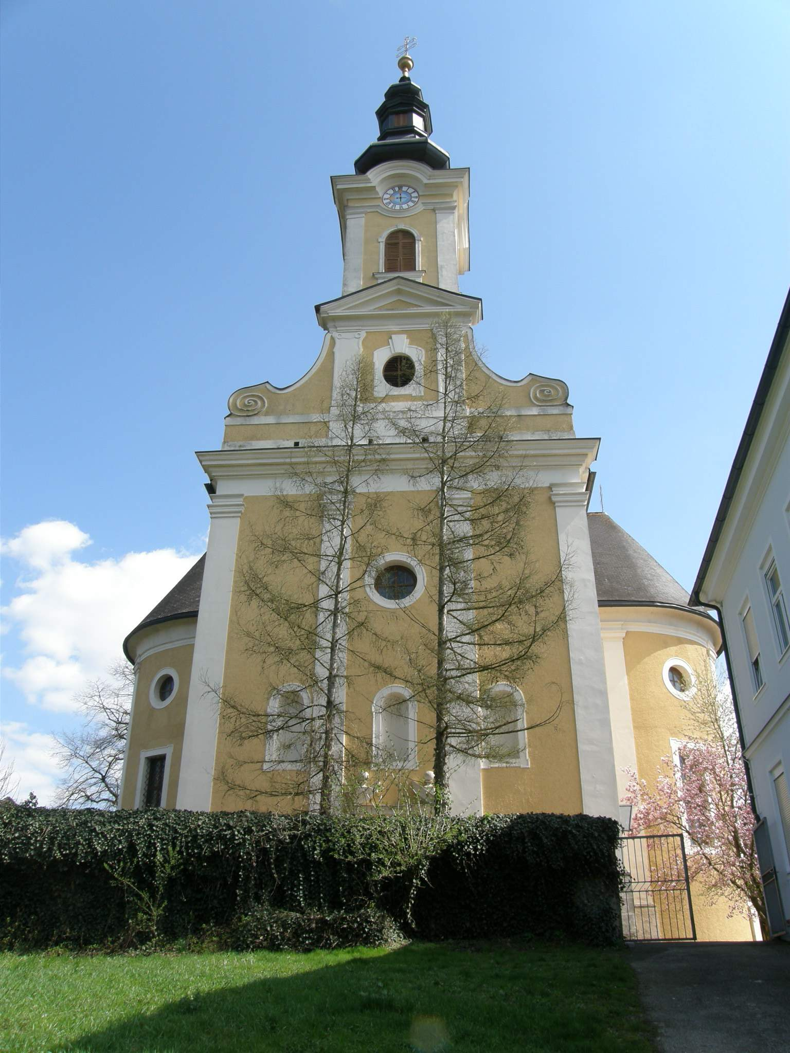 Kirche von Gabersdorf